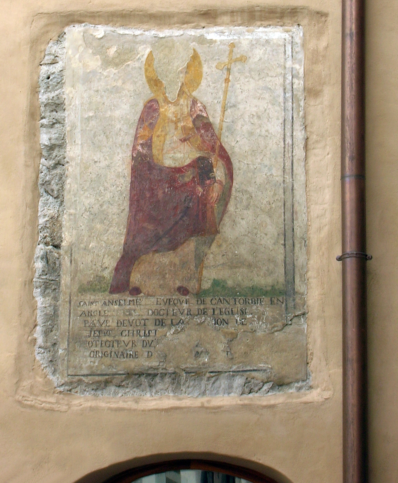 Dettaglio dell'affresco su Sant'Anselmo nella Casaforte di Sant'Anselmo, detta anche "Torre di Sant'Anselmo" o "Casaforte di La Bagne". A Gressan, Valle d'Aosta, Italia.